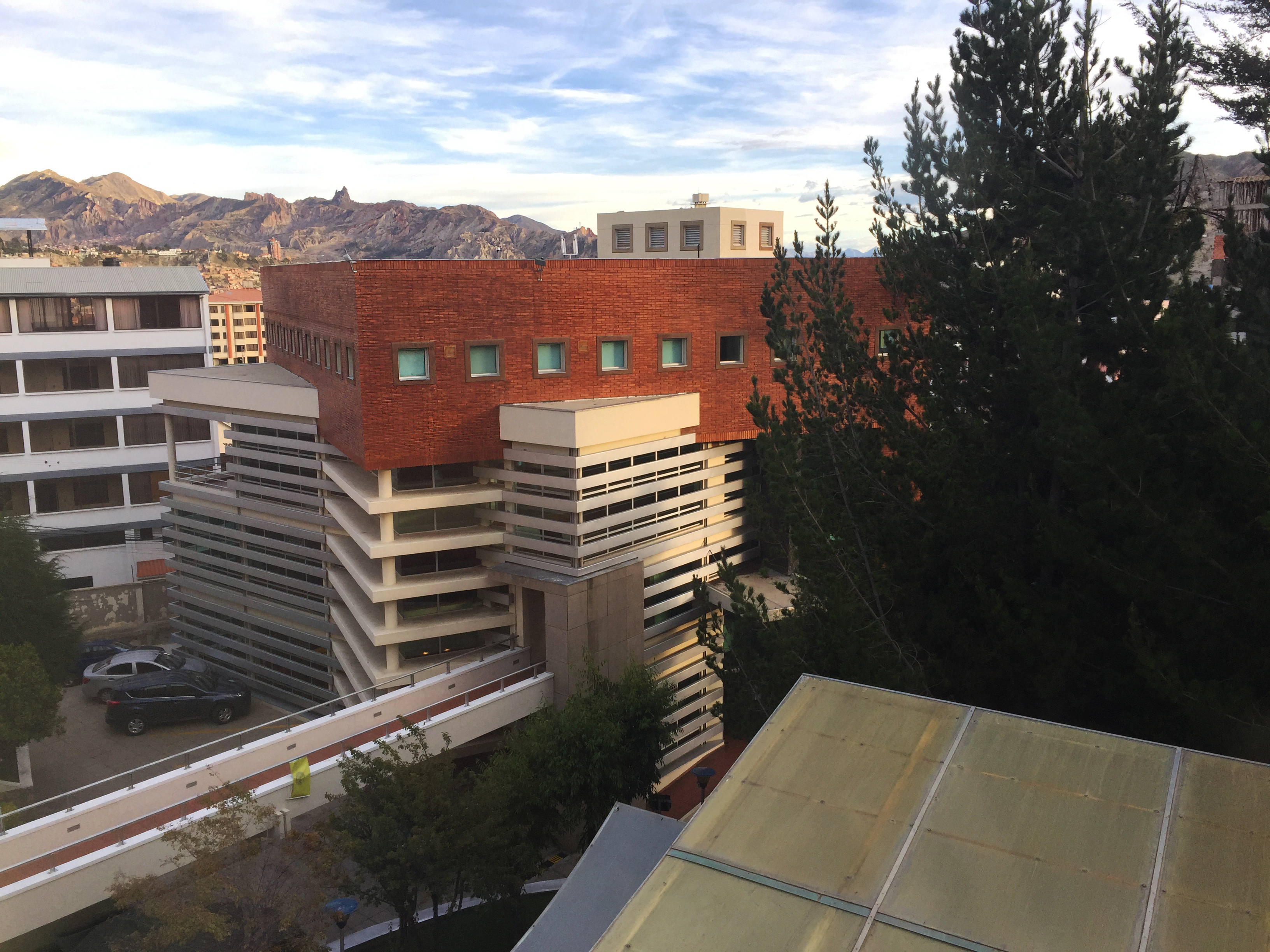 Bilbioteca Central de la Universidad Católica Boliviana San Pablo.